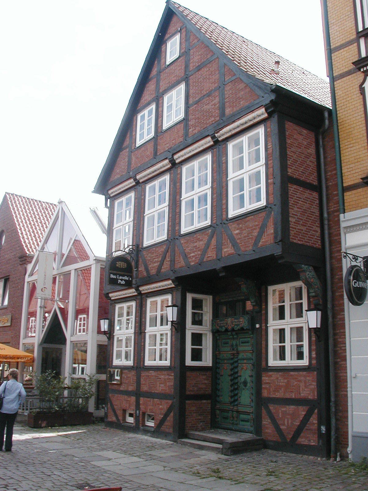 Das Gebäude Lämmertwiete 9 21073 Hamburg-Harburg